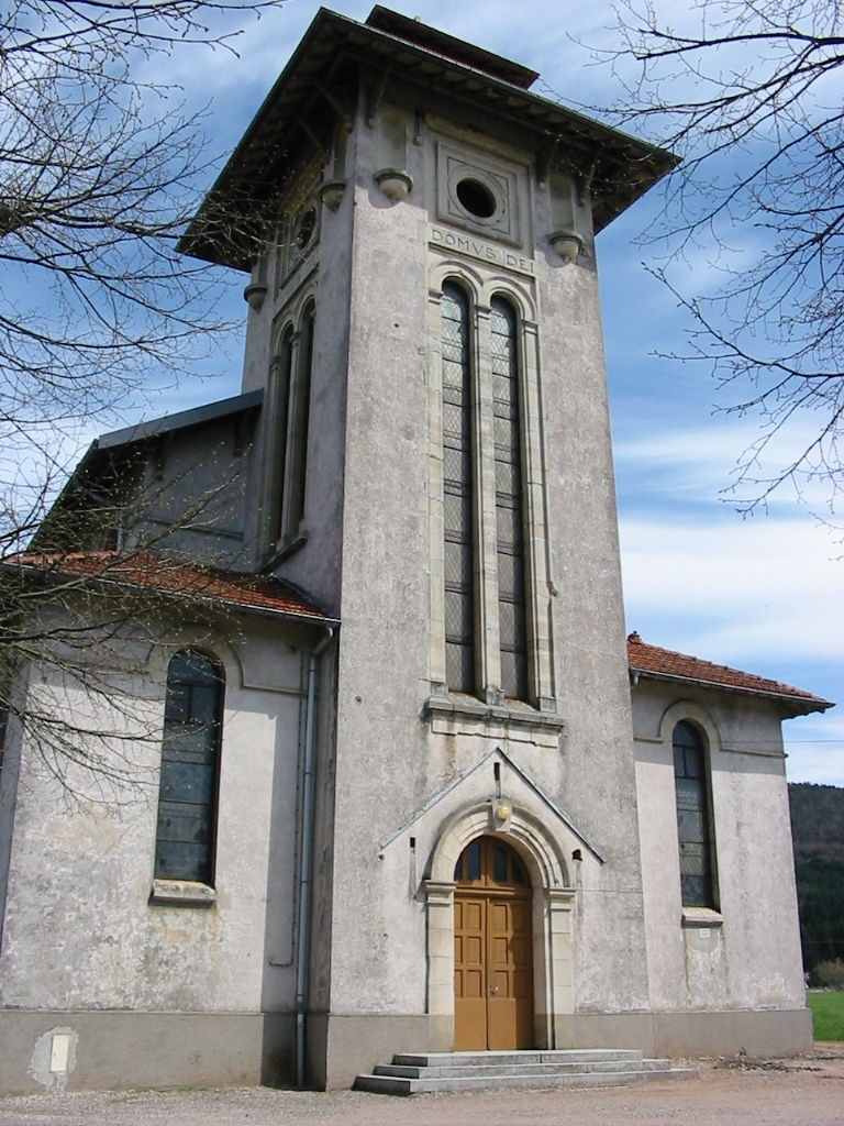 Aumontzey Commune des Vosges L'église Notre-Dame-du-Saint-Rosaire Photographie personnelle, prise le 23 avril 2006 Copyright © Christian Amet